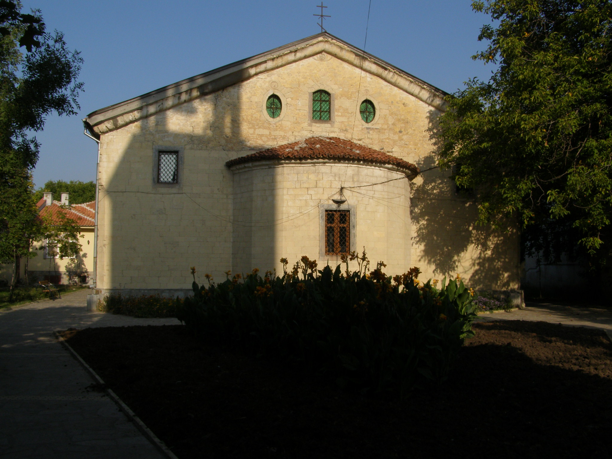 Църквата "Успение Богородично" в Хасково